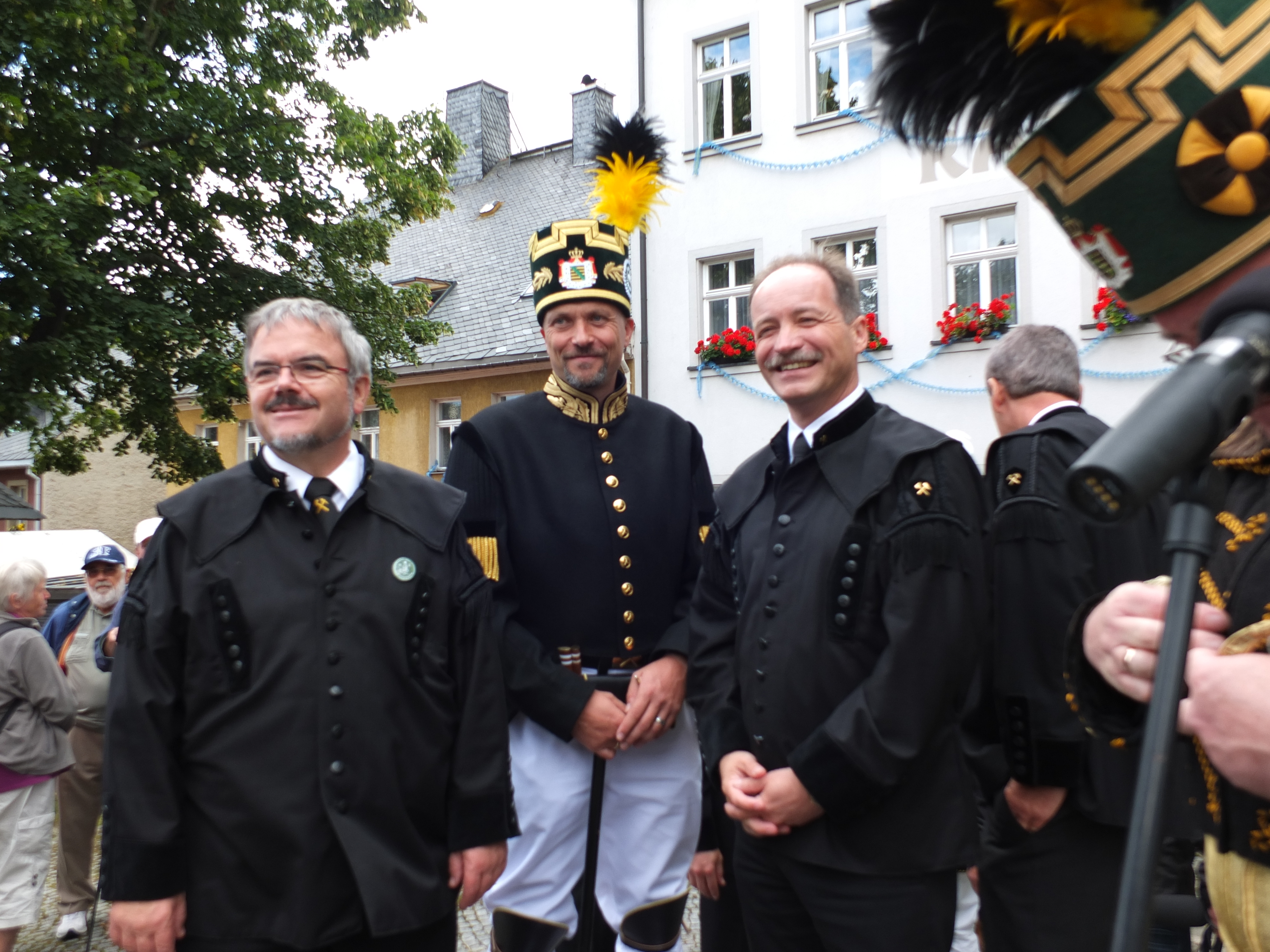 4. Sächsischer Bergmanns-, Hütten- und Knappentag 2012 in Jöhstadt - Große Bergparade am 26.08.2012 Landrat des Erzgebirgskreises Frank Vogel, Oberberghauptmann Prof. Bernhard Cramer, sächsischer Staatsminister für Wirtschaft, Arbeit und Verkehr Sven Morlok (v.l.n.r.)